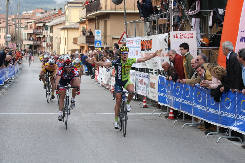 Leonardo Pinizzotto della Vangi vince la volata dell'edizione 2008 del GP Pretola.